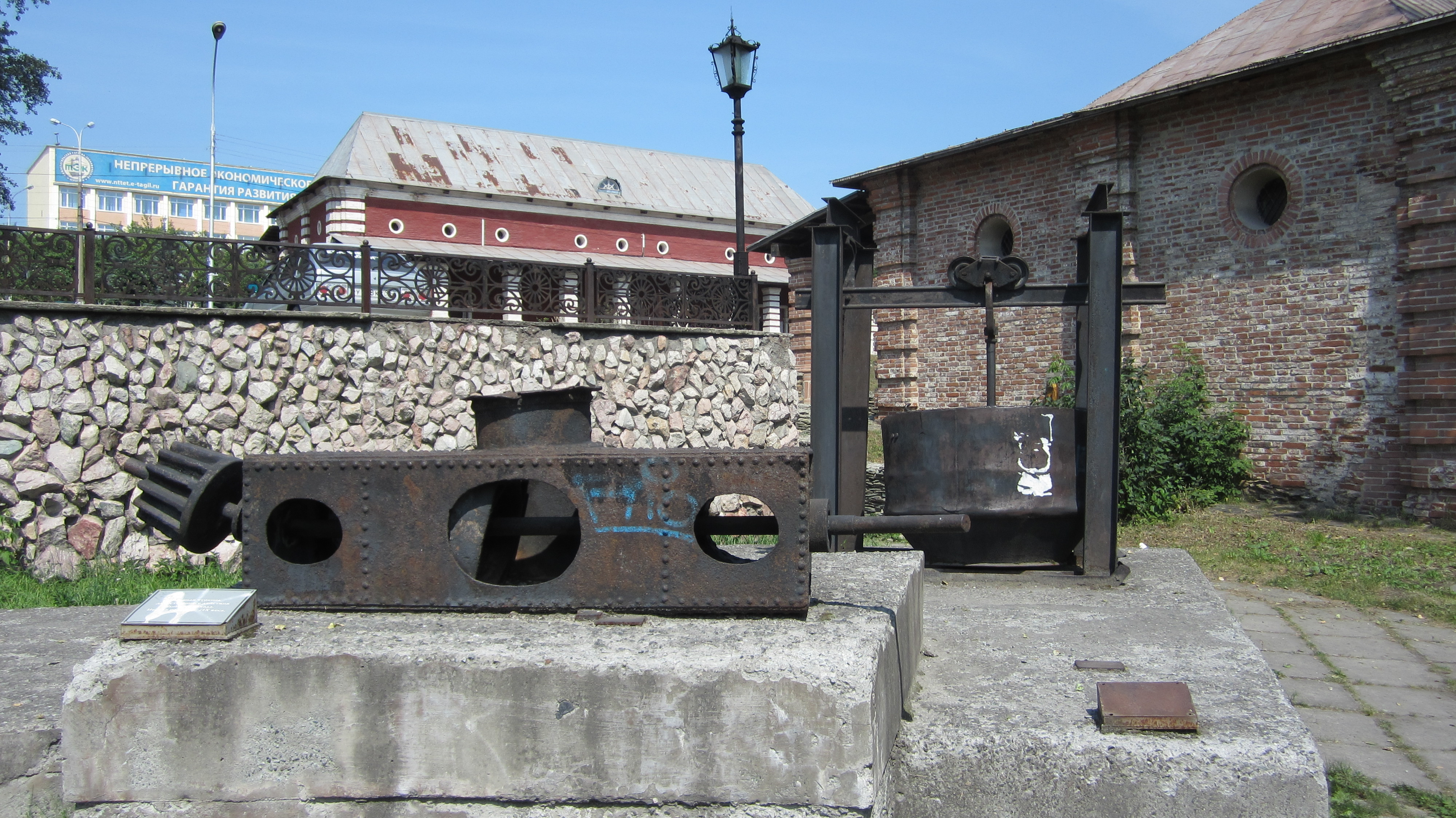 Водяная турбина двухcтороннего действия Выйского завода. Первая половина ХIХ века (г.Нижний Тагил, Свердловская область)